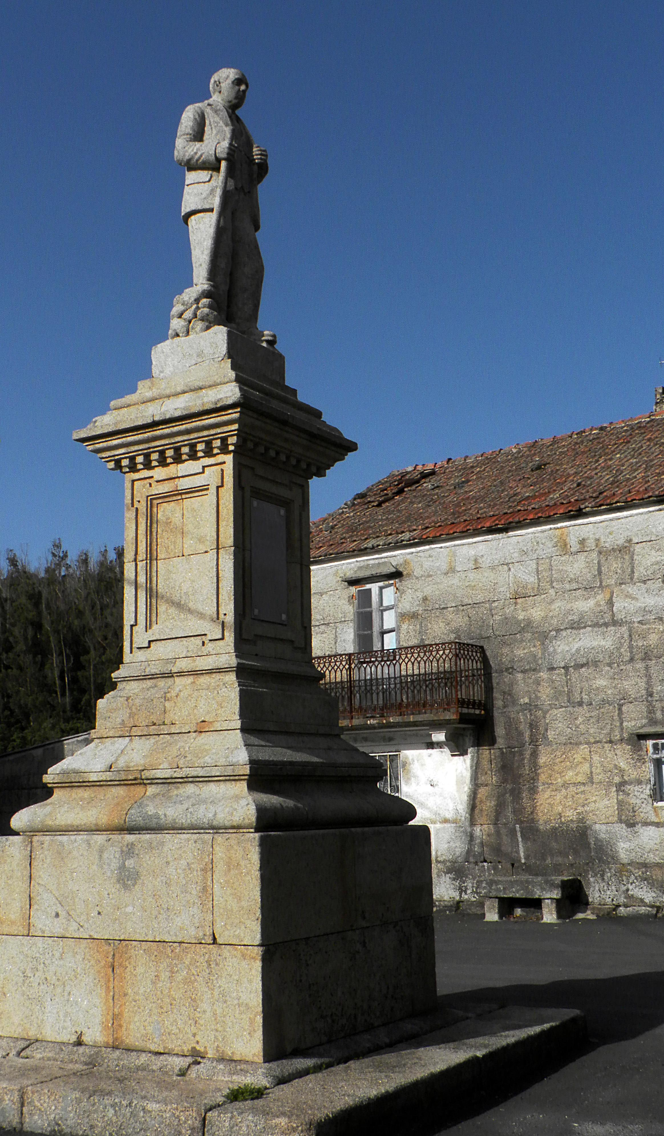 En la placa de la estatua dice lo siguiente: A Don Manuel Barreiro Cabanelas, hijo y protector de este pueblo. En testimonio de eterna gratitud de sus vecinos. Covelo 1 de Enero de 1944